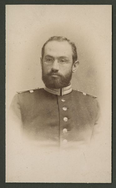 Wilhelm Köhl (1859-1942) - bayerischer Offizier und Generalleutnant